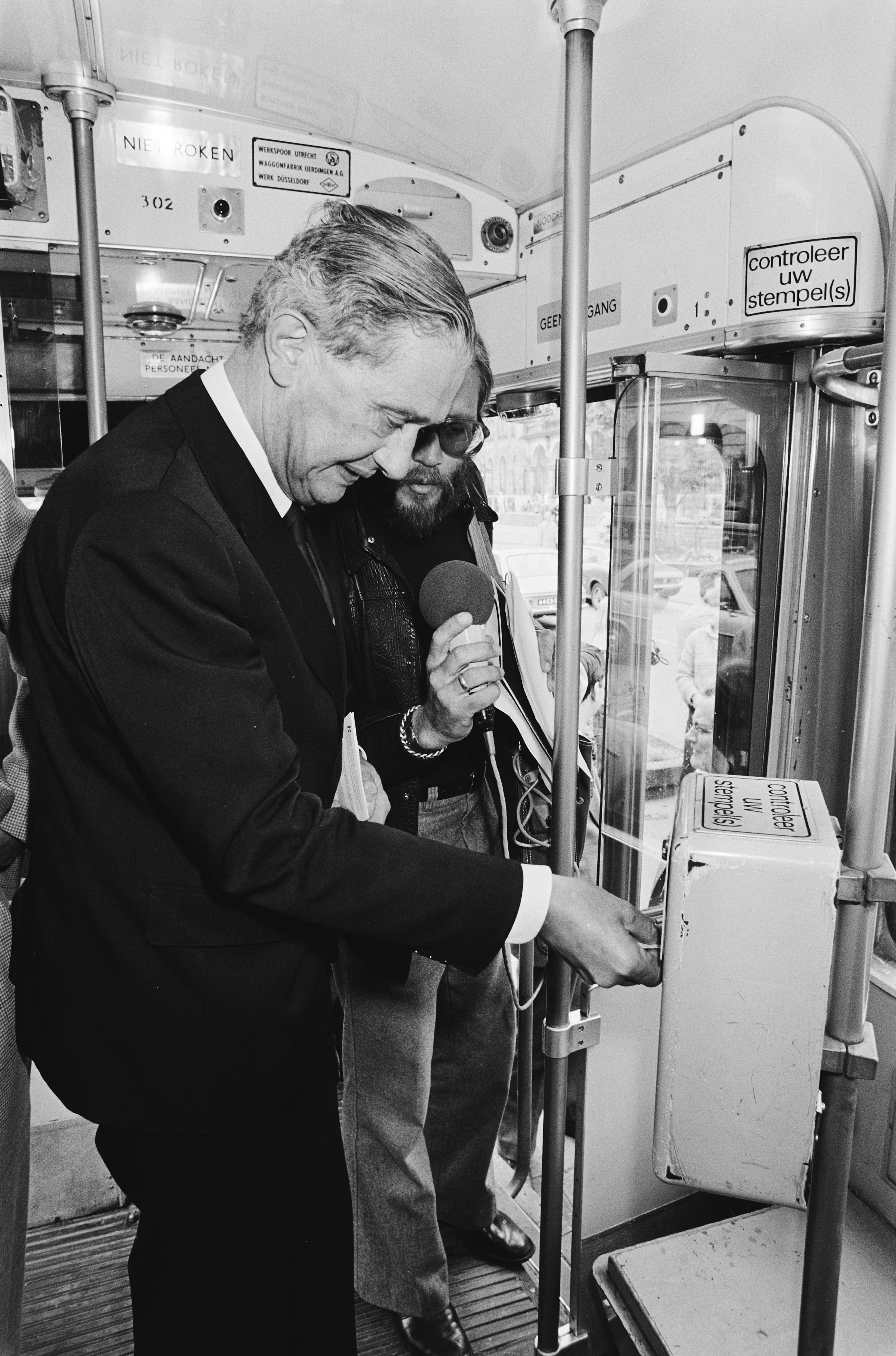 Collectie / Archief : Fotocollectie Anefo Reportage / Serie : [ onbekend ] Beschrijving : Minister Tuijnman koopt 1e "strippenkaart" (voor stads- en streekvervoer in heel Nederland) in Rotterdam; Datum : 7 mei 1980 Locatie : Rotterdam, Zuid-Holland Trefwoorden : STREEKVERVOER, ministers Fotograaf : Croes, Rob C. / Anefo Auteursrechthebbende : Nationaal Archief Materiaalsoort : Negatief (zwart/wit) Nummer archiefinventaris : bekijk toegang 2.24.01.05 Bestanddeelnummer : 930-8185